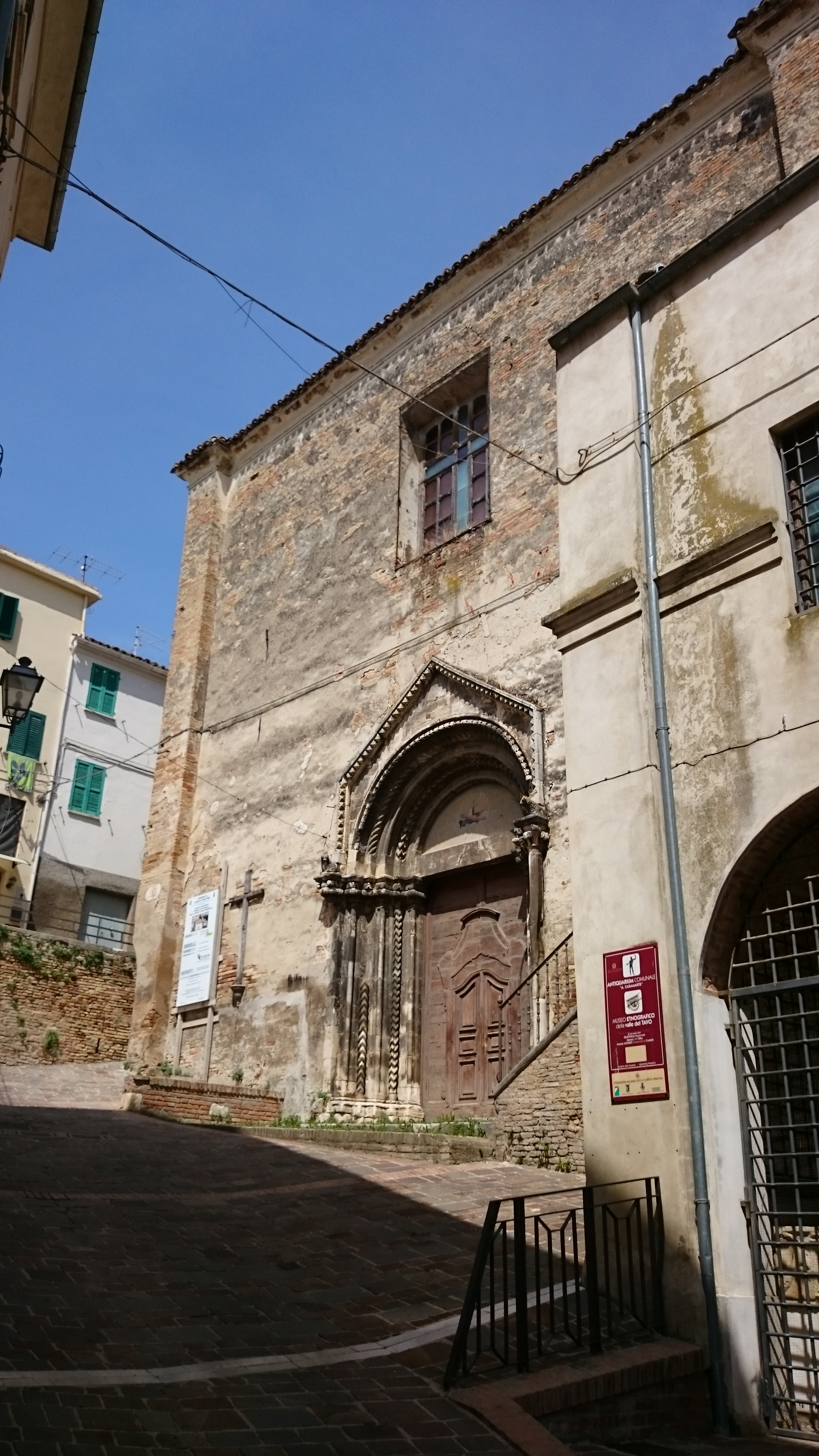 Loreto Aprutino